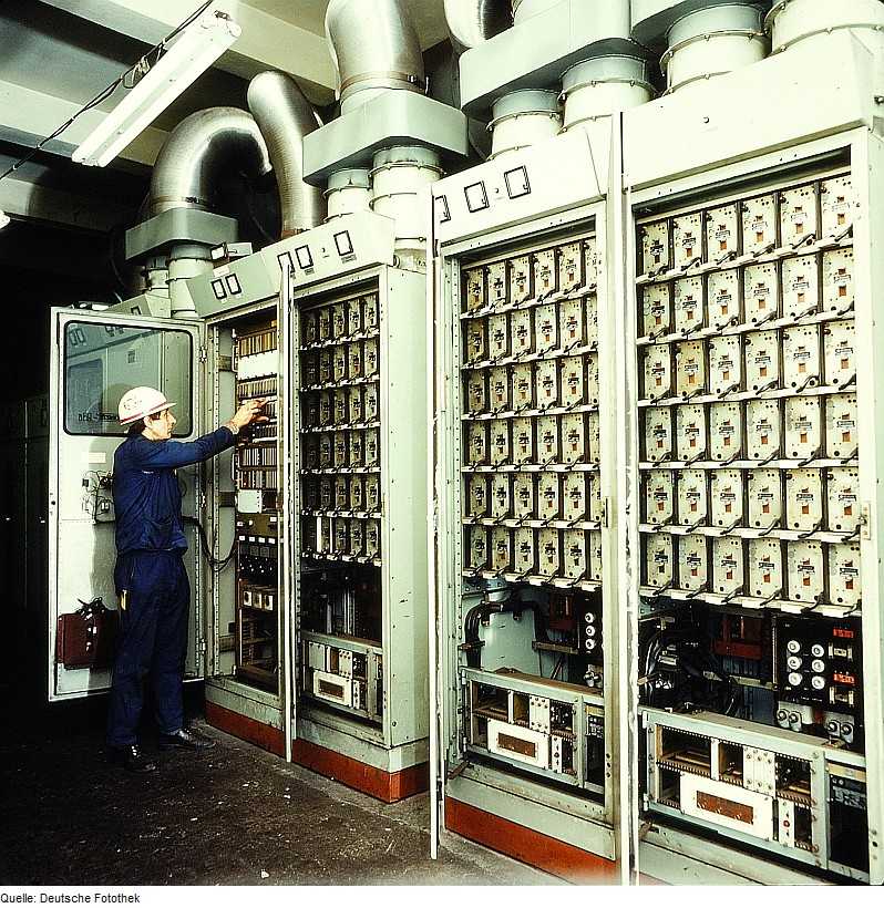 Original image description from the Deutsche FotothekElektromonteur